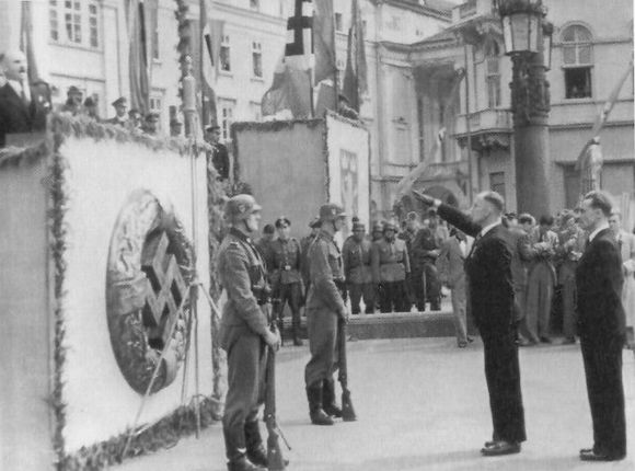 Майор Евген Побігущий підходить до трибуни, салютує: парад рекрутів до дивізії СС «Галичина» у Львові